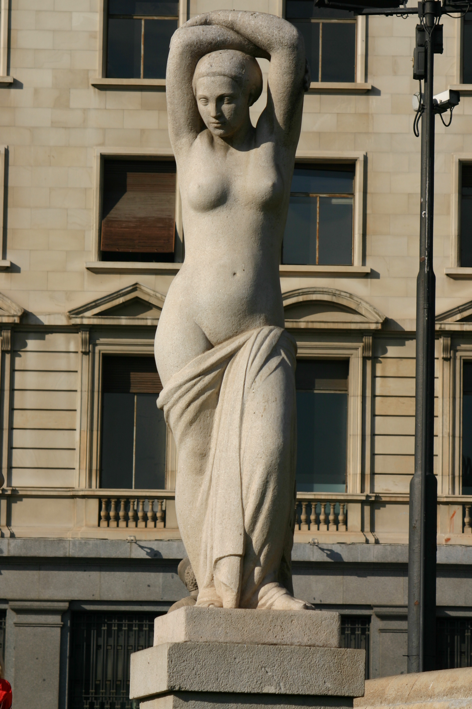 Juventut. Plaza Catalunya. Barcelona (Spain)